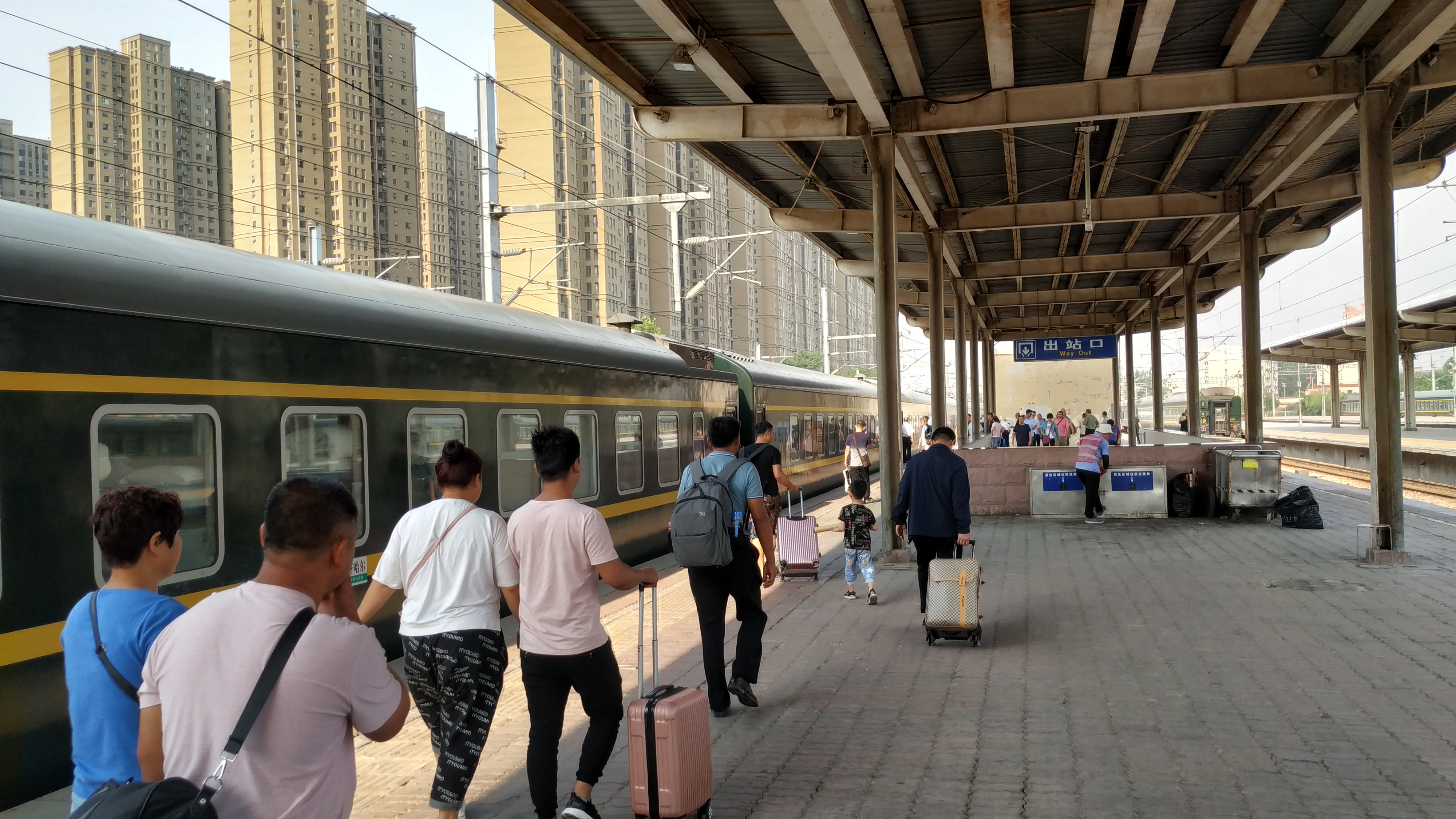 中文（中国大陆）: K1084列车在石家庄北站